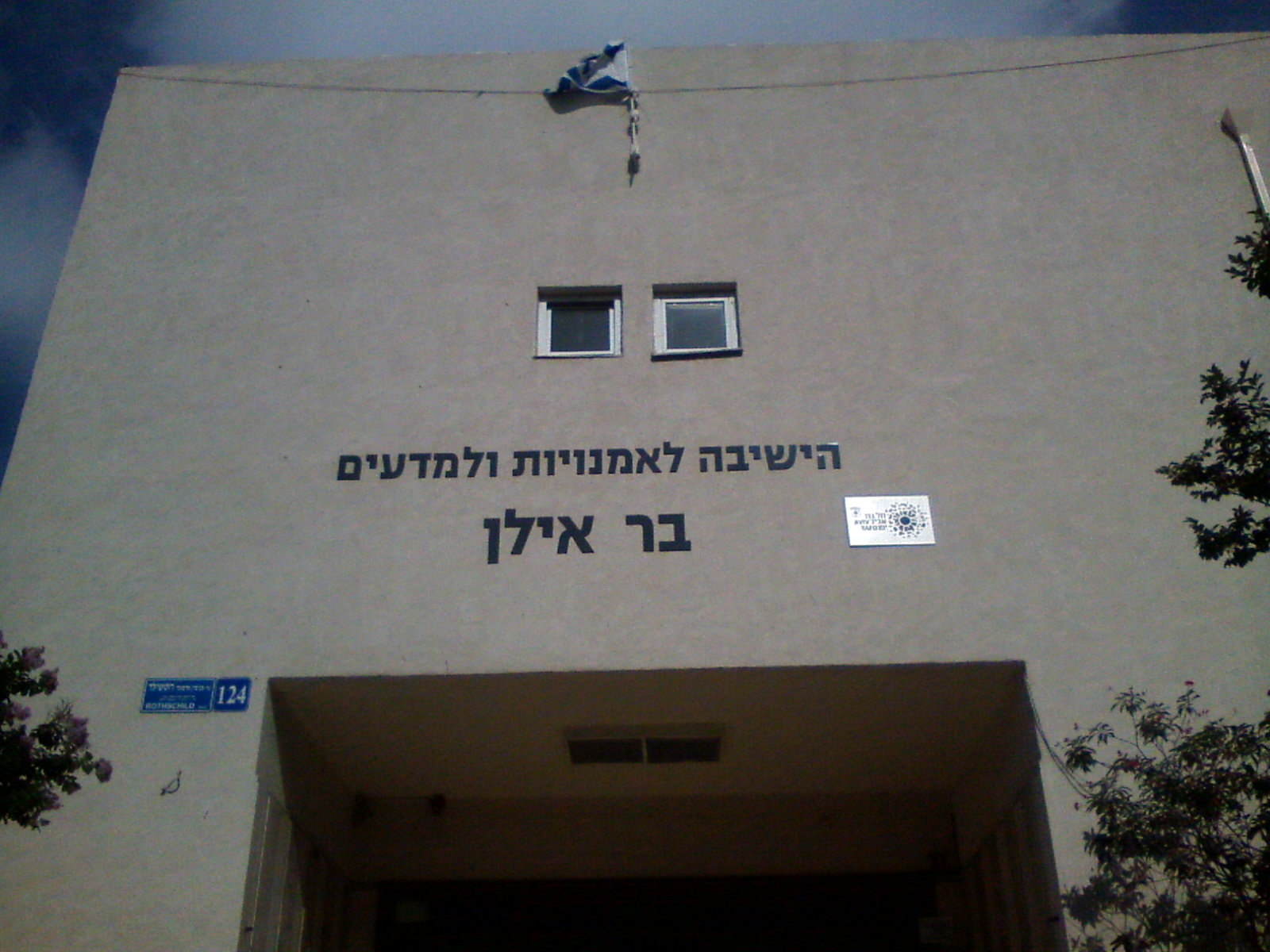 החזית החדשה של הישיבה לאמנויות ולמדעים בר-אילן תל אביב מ-2018